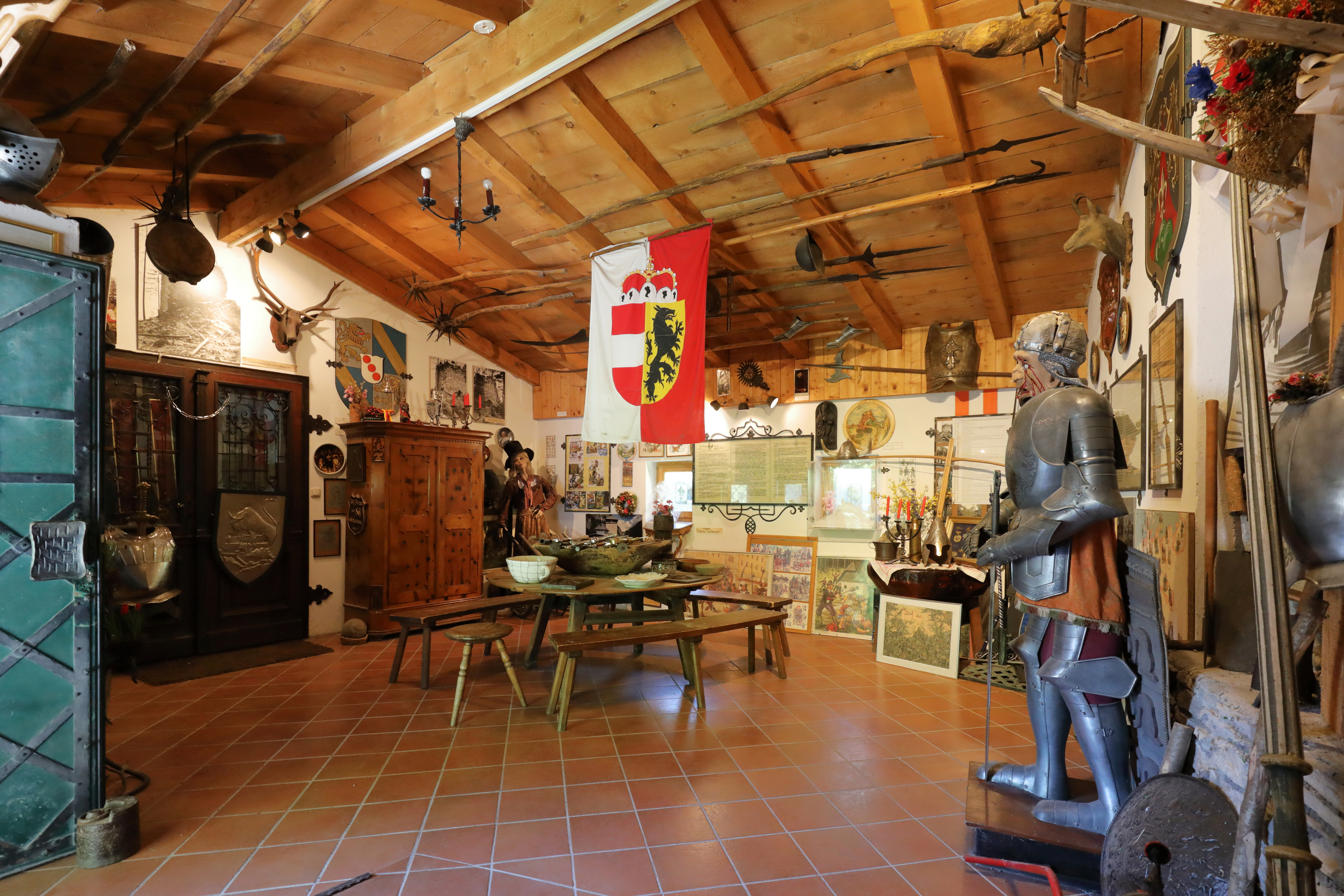 Erster Ausstellungsraum der Burg Klammstein in der Salzburger Gemeinde Dorfgastein.Die Burg wurde im 13. Jahrhundert auf einem etwa 30 m hohen Felsen oberhalb der Gasteiner Klamm bzw. am Taleingang des Gasteinertales errichtet. Ab dem 16. Jahrhundert verfiel die Burg und das Mauerwerk wurde teilweise als Steinbruch für andere Bauten verwendet. 1972 kaufte ein Adolf Ferner die Ruine den Österreichischen Bundesforsten ab und sanierte die Burg bzw. baute sie teilweise wieder auf und richtete im Bergfried ein Museum ein.